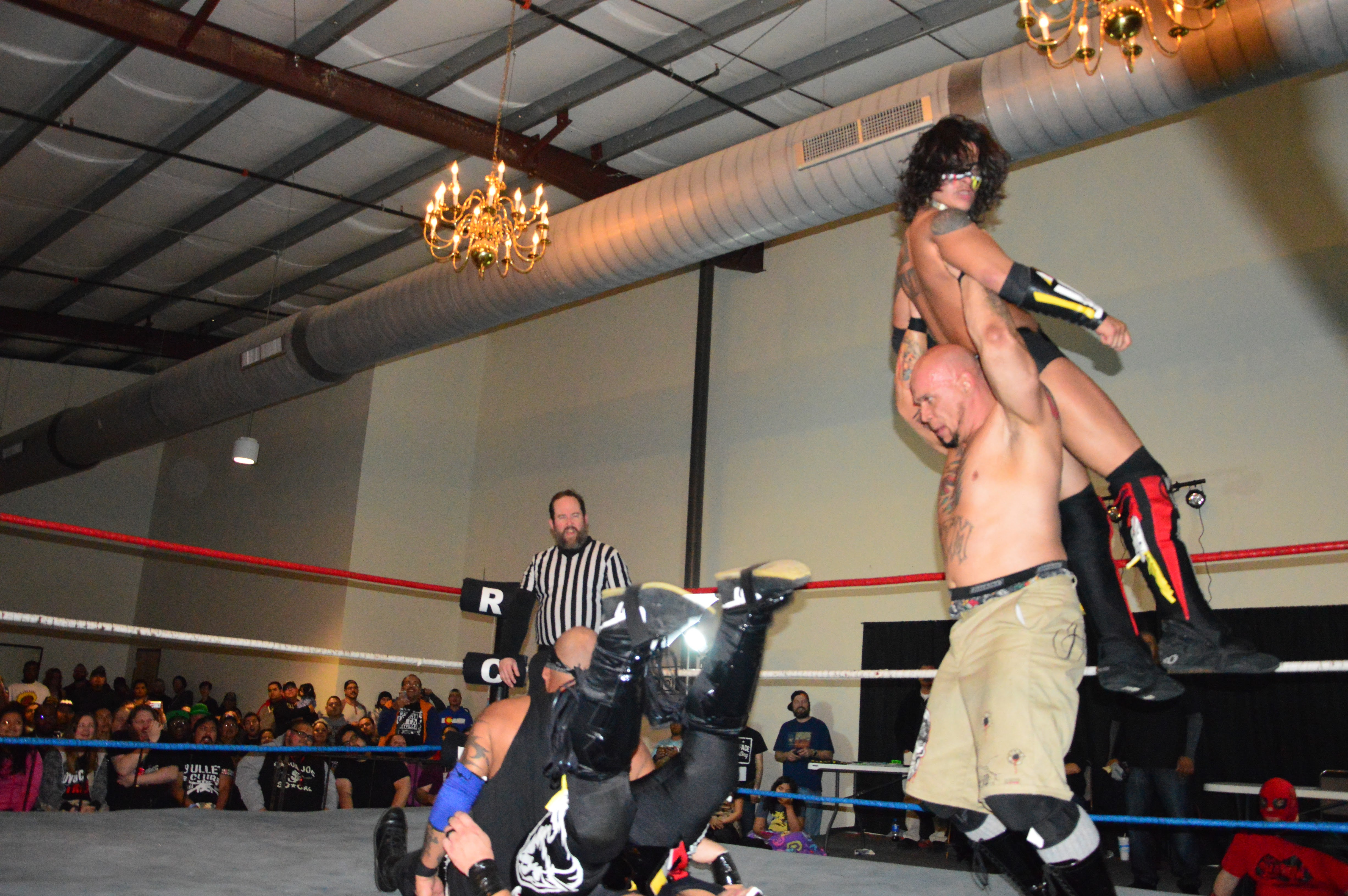 Le catcheur Shawn Hernandez effectue une crucifix powerbomb.